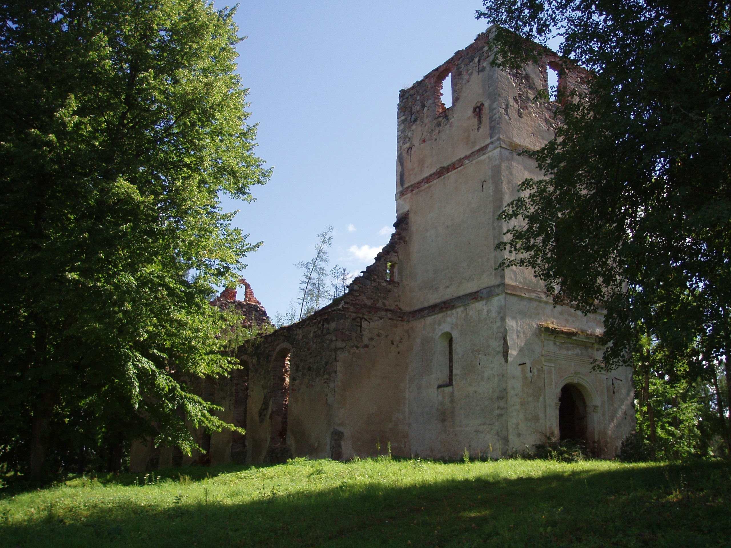 Härgmäe kiriku varemed 2007. aastal.